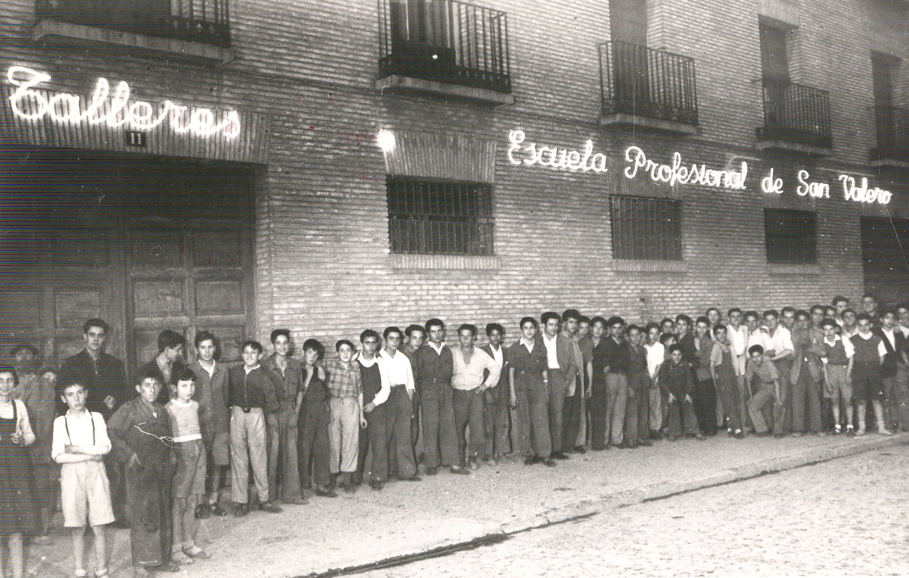 Escuela de San Valero pasa de ser una obra parroquial a ser diocesana con los nuevos talleres. Zaragoza 1953